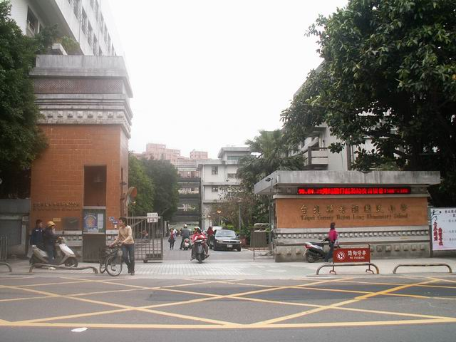 臺灣新北市永和區秀朗國小校門。